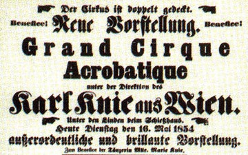 Plakat des Circus Karl Knie zur Vorstellung vom Dienstag 16. Mai 1854, unter den Linden in Berlin